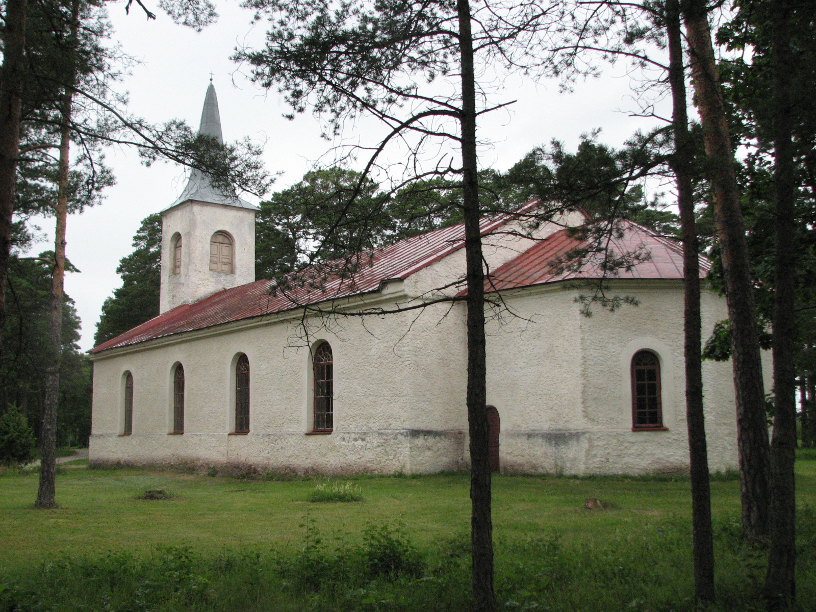 Emmaste Church, Emmaste, Hiiumaa, Estonia. Year 2008